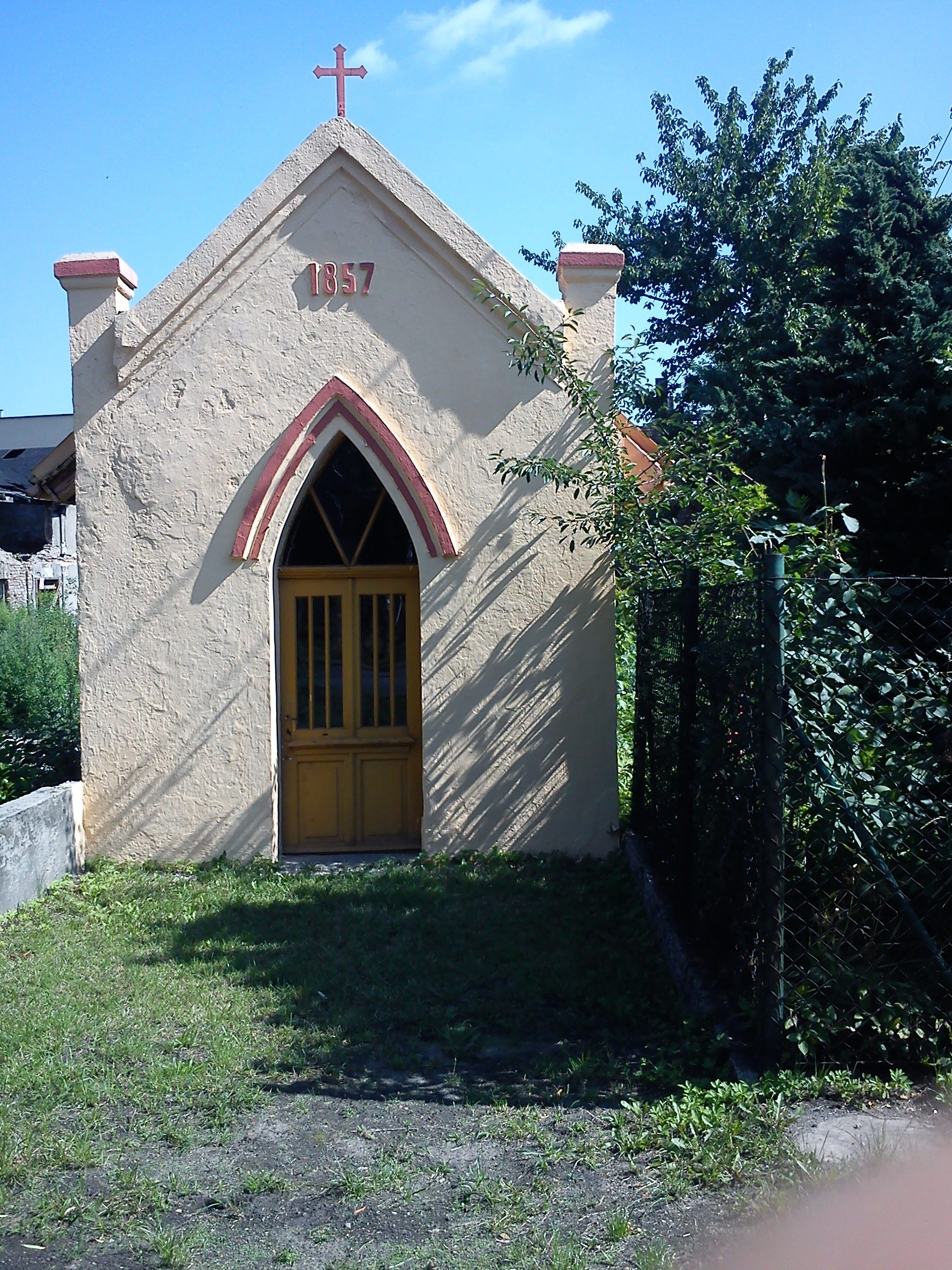 Sosnowiec-Niwka.Kapliczka z 1857 r.